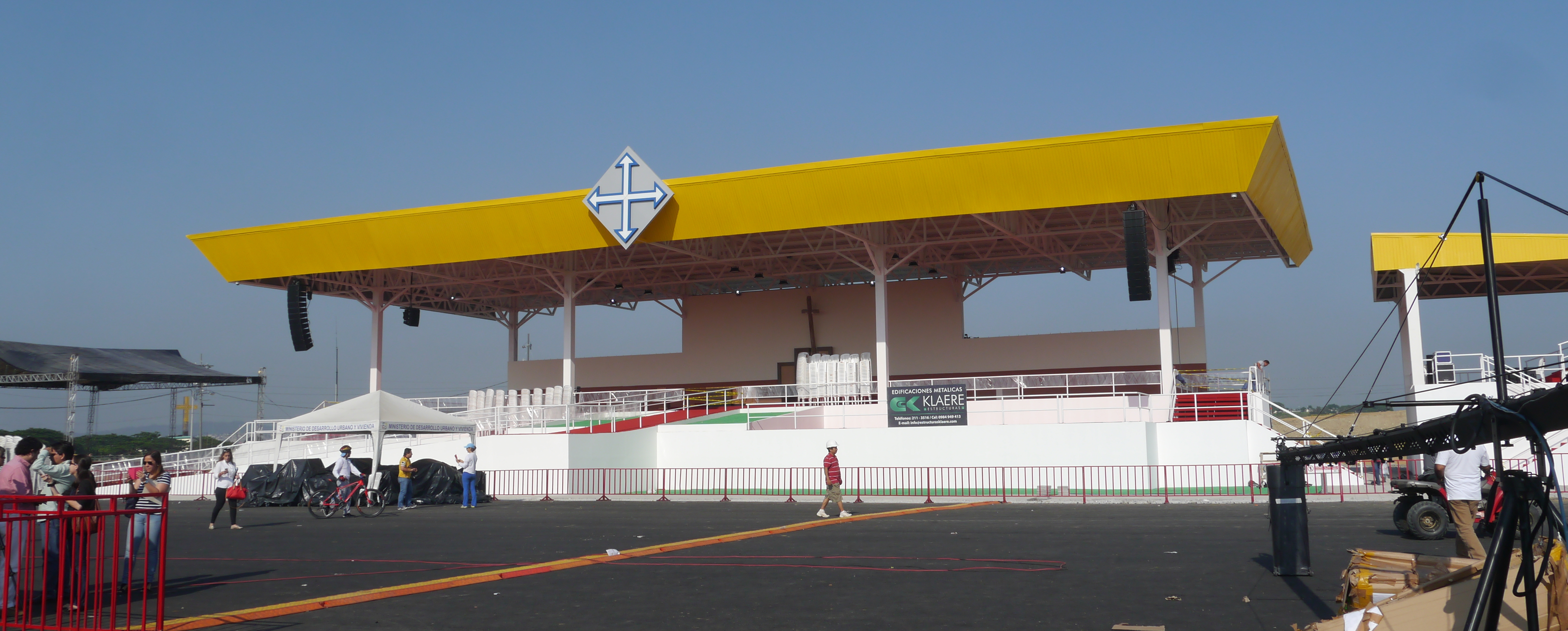 Templete papal para la Misa Campal a realizarse en el Parque Samanes de Guayaquil